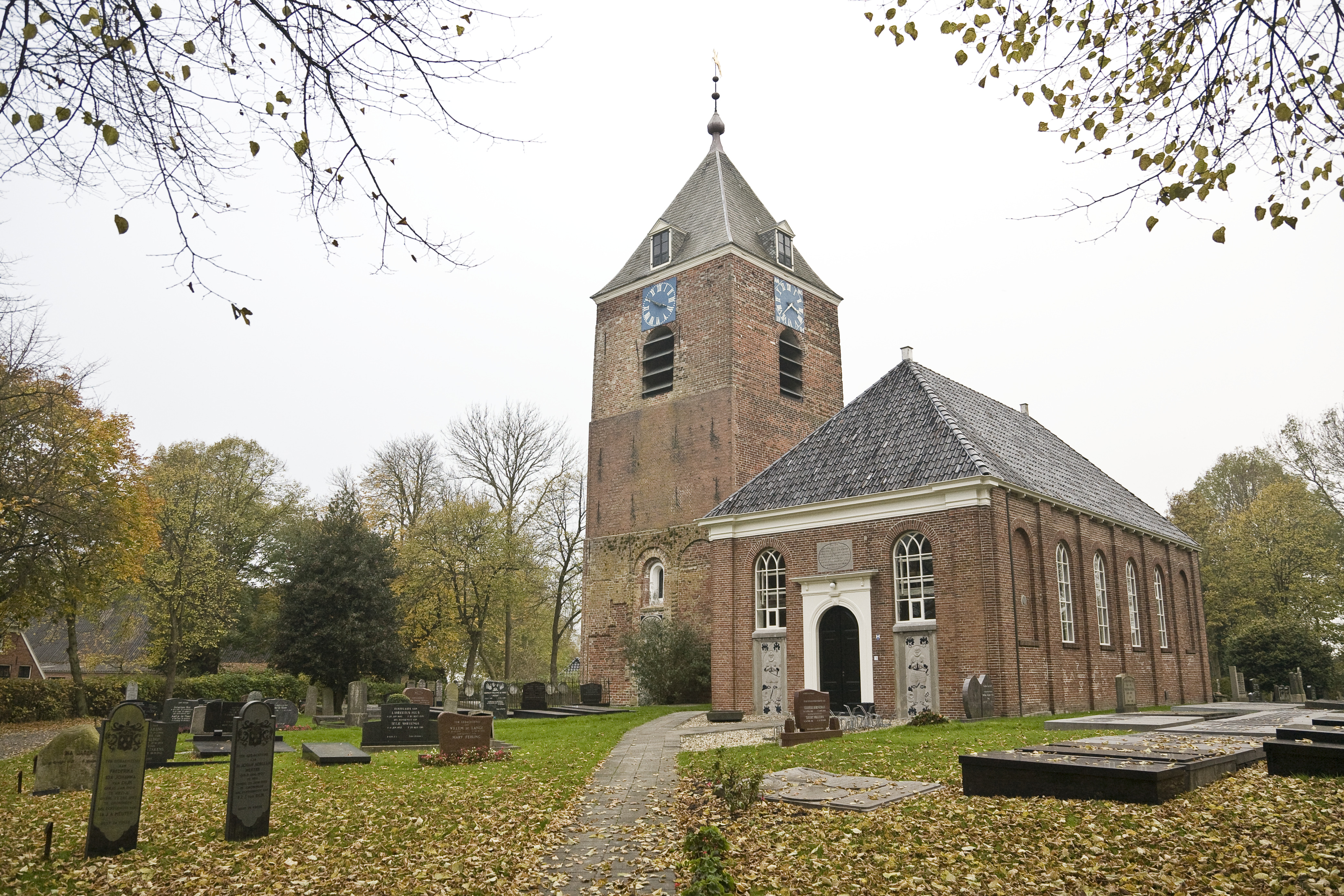 Nederlands Hervormde Kerk: Overzicht Toren Hervormde kerk, westgevel met ingangspartij (opmerking: Publicatie: TRAP Appingedam en Delfzijl (Cultuur Historische Routes in Nederland - 59))